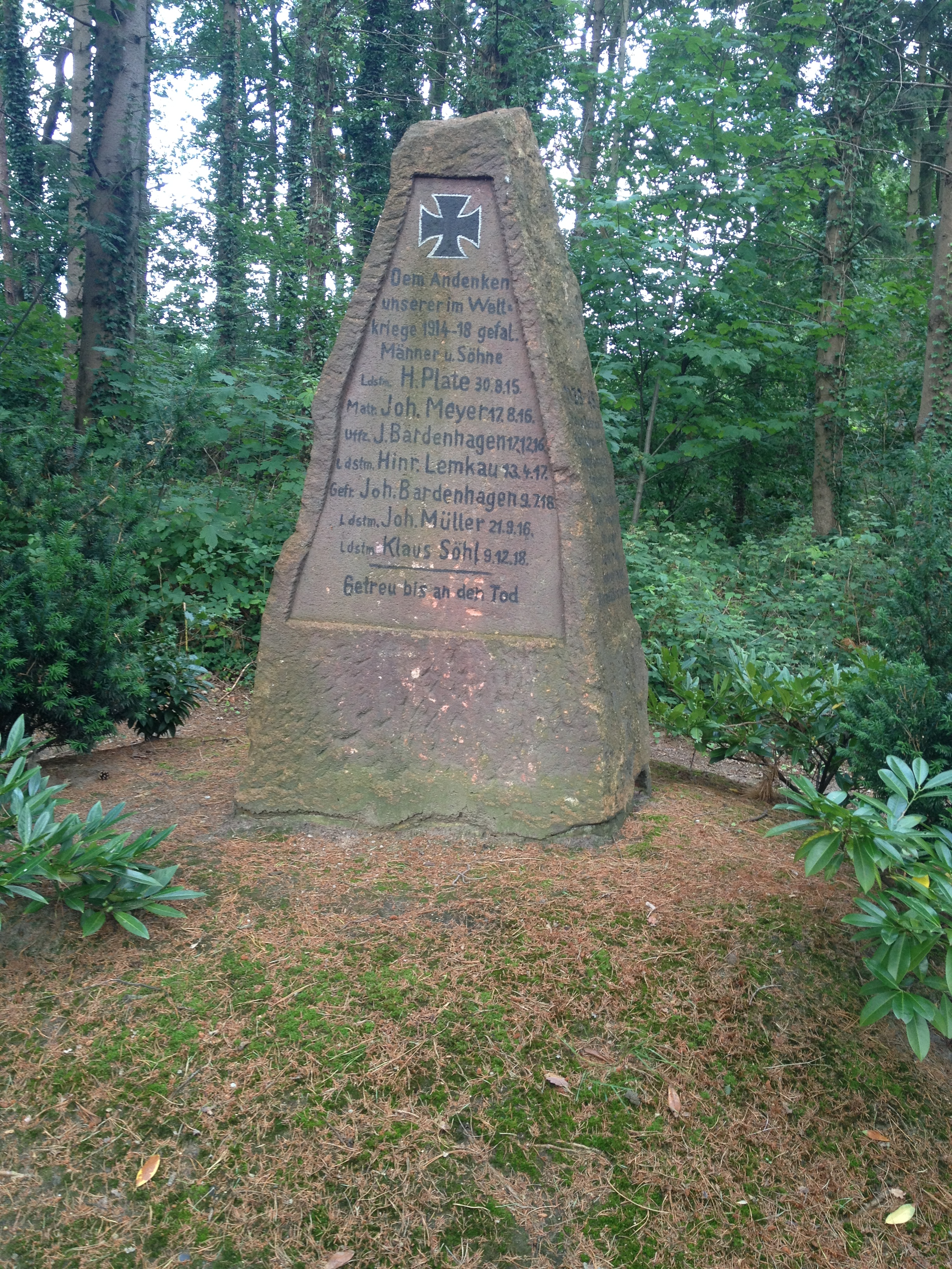 Kriegerdenkmaal in Lohmöhlen